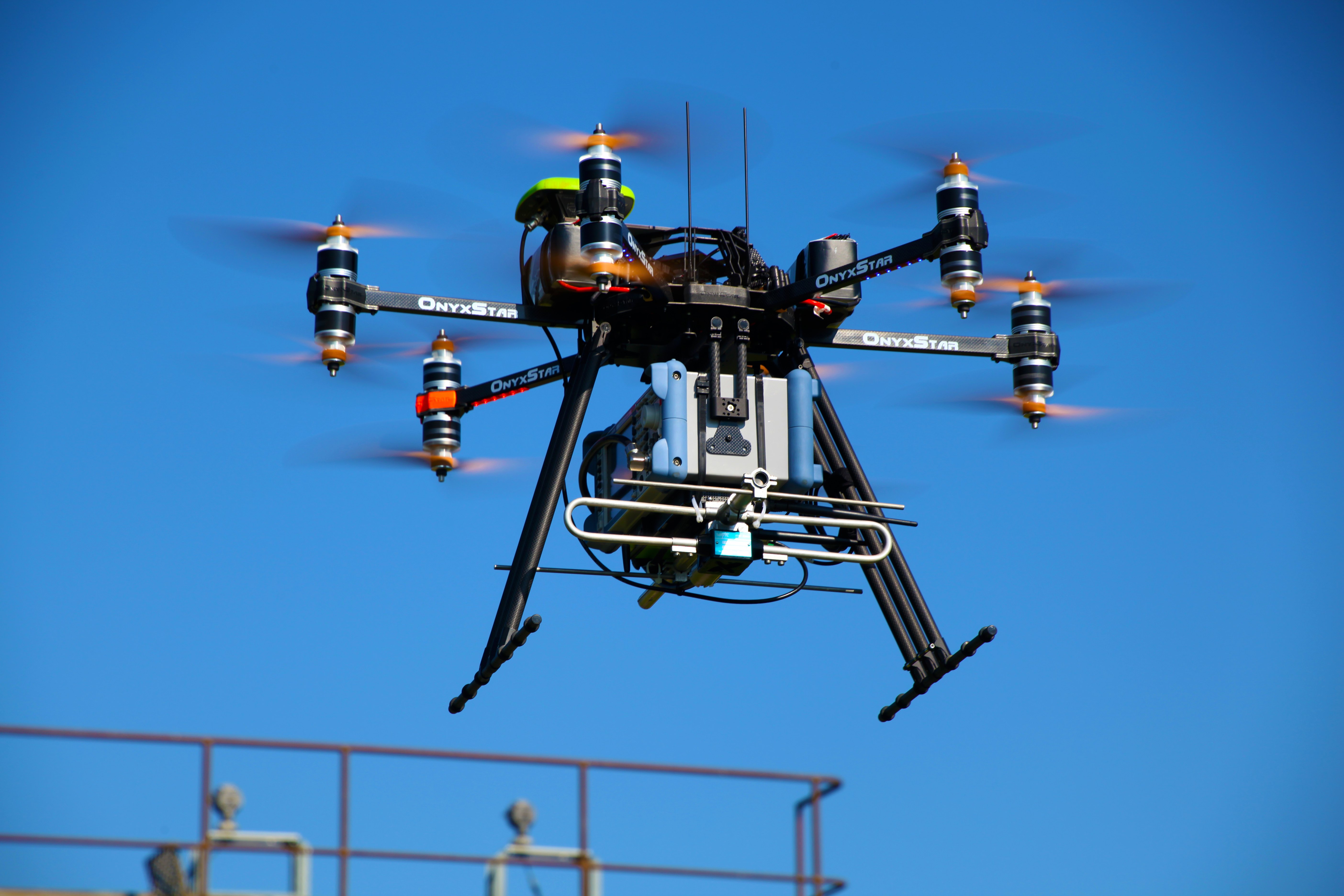 Drone hexacopter coaxial emportant 12 kg d'appareils de mesures